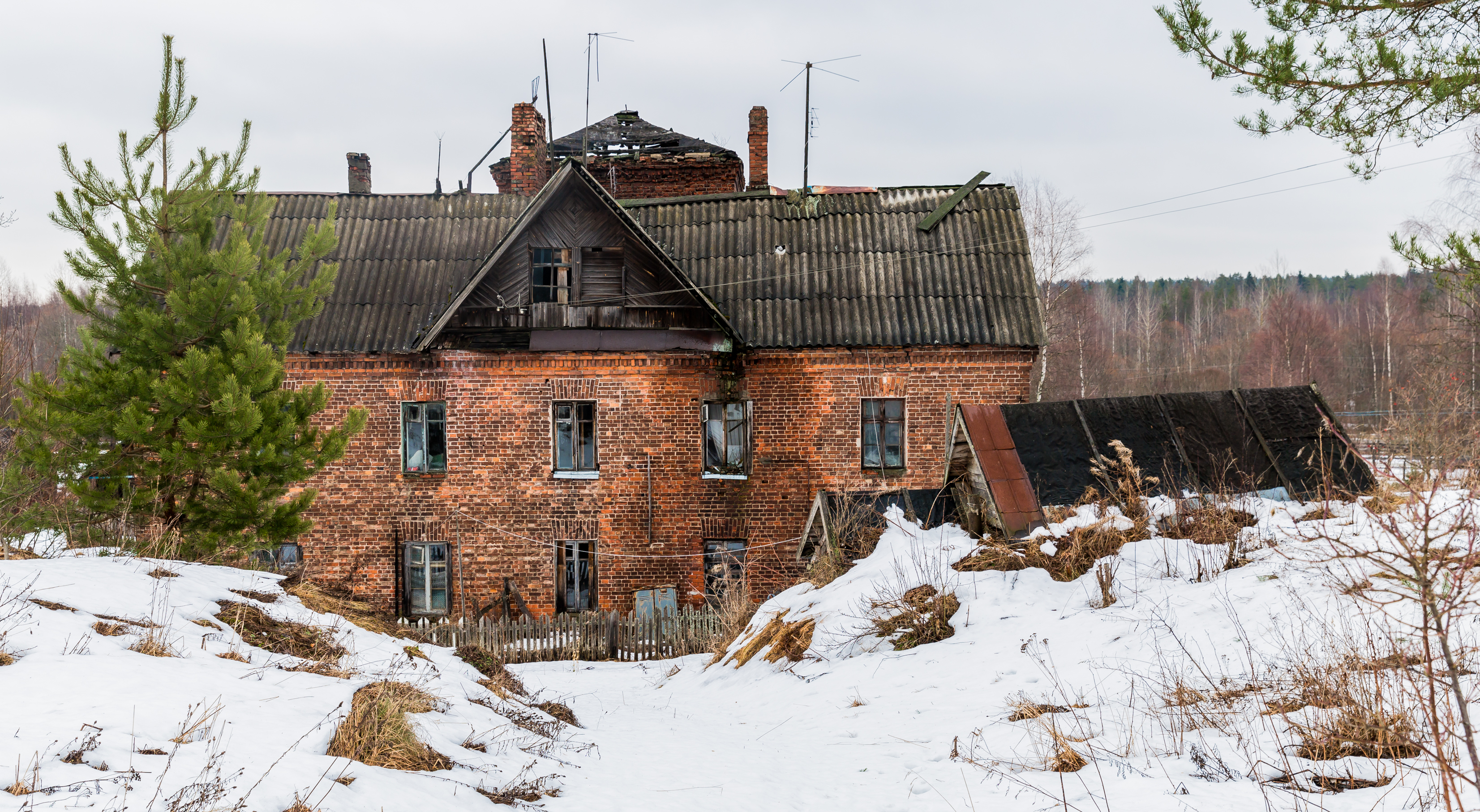 Savikon tiilitehtaan alue, Perkjärvi